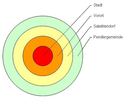 Abbildung der Abgrenzung von Satellitendörfern zu Vororten und Pendlergemeinden.